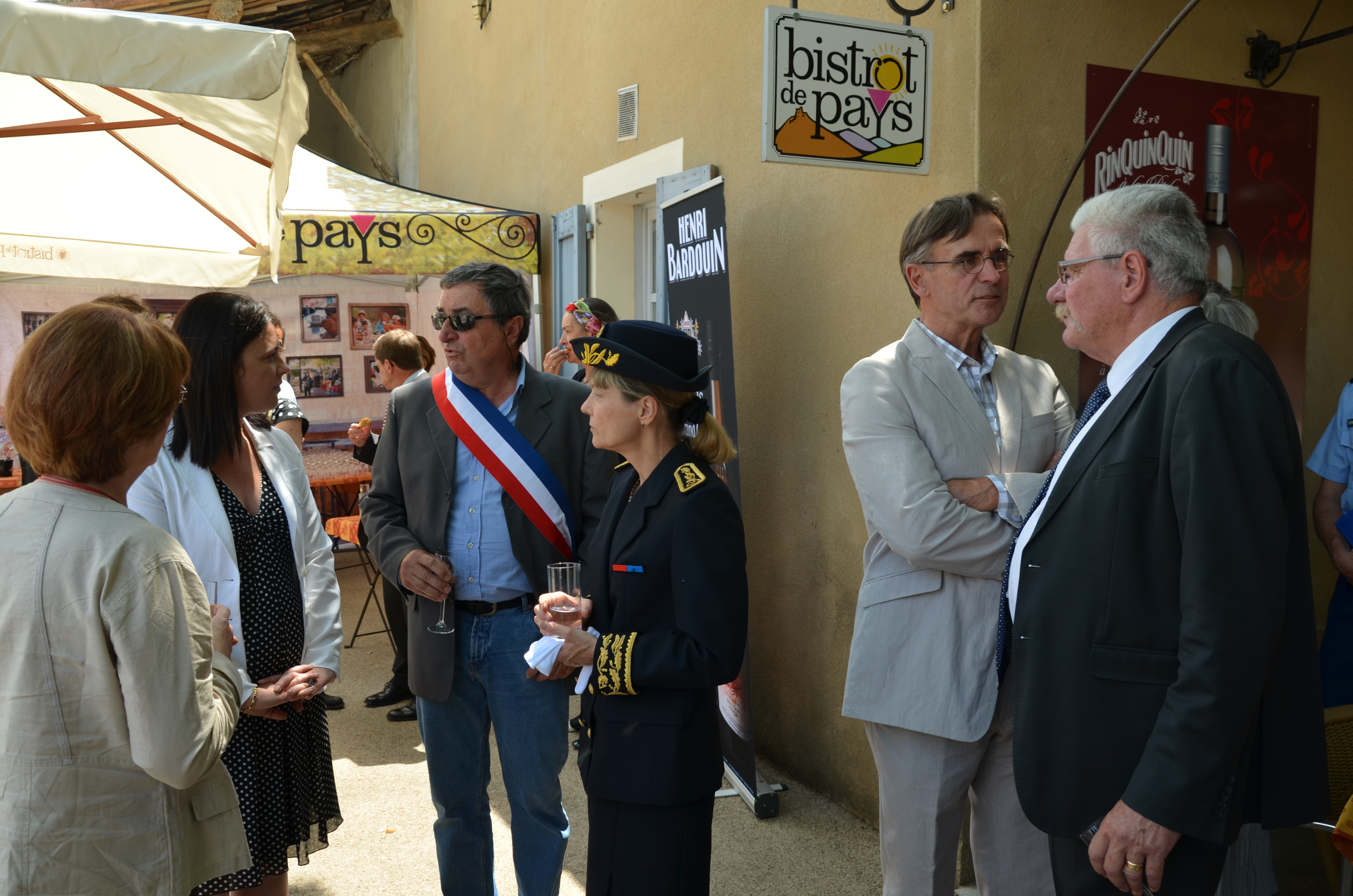 Sylvia Pinel, ministre du Tourisme, visitant le Bistrot de pays de Niozelles